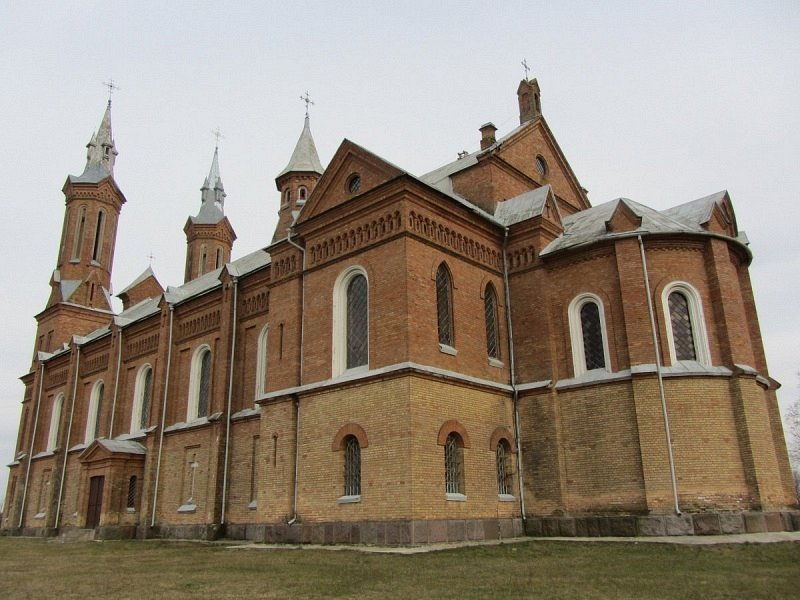 Нача. Касцёл Унебаўзяцця Найсвяцейшай Дзевы Марыі